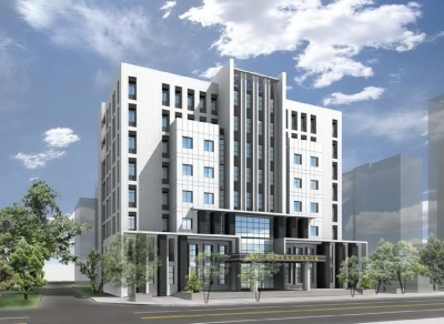 中文（台灣）: 一張法務部行政執行署高雄分署辦公廳舍的模擬圖。